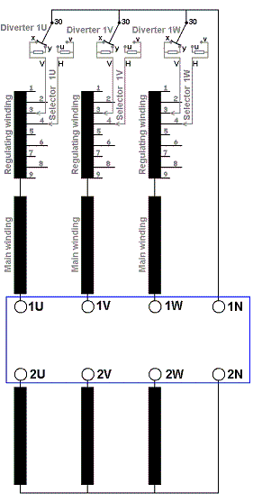 Een schematische voorstelling van een vermogentransformator met een lastchakelaar in het sterpunt van de hoogspanningswikkeling.